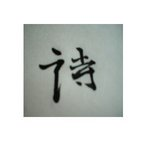 Stile Gyosho